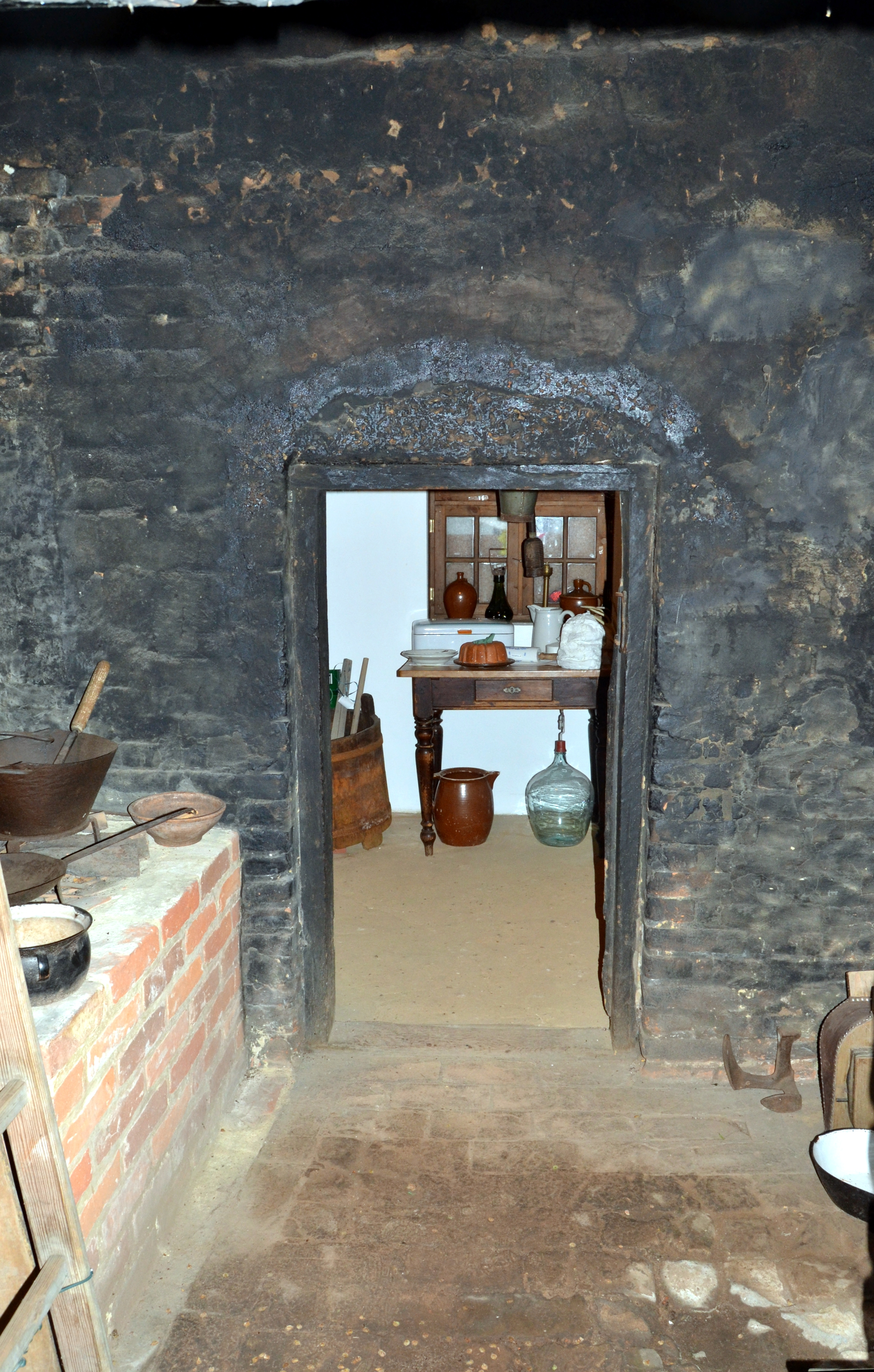 Das Heimathaus in Schöneiche bei Berlin; Blick in den Innanraum (Schwarze Küche).